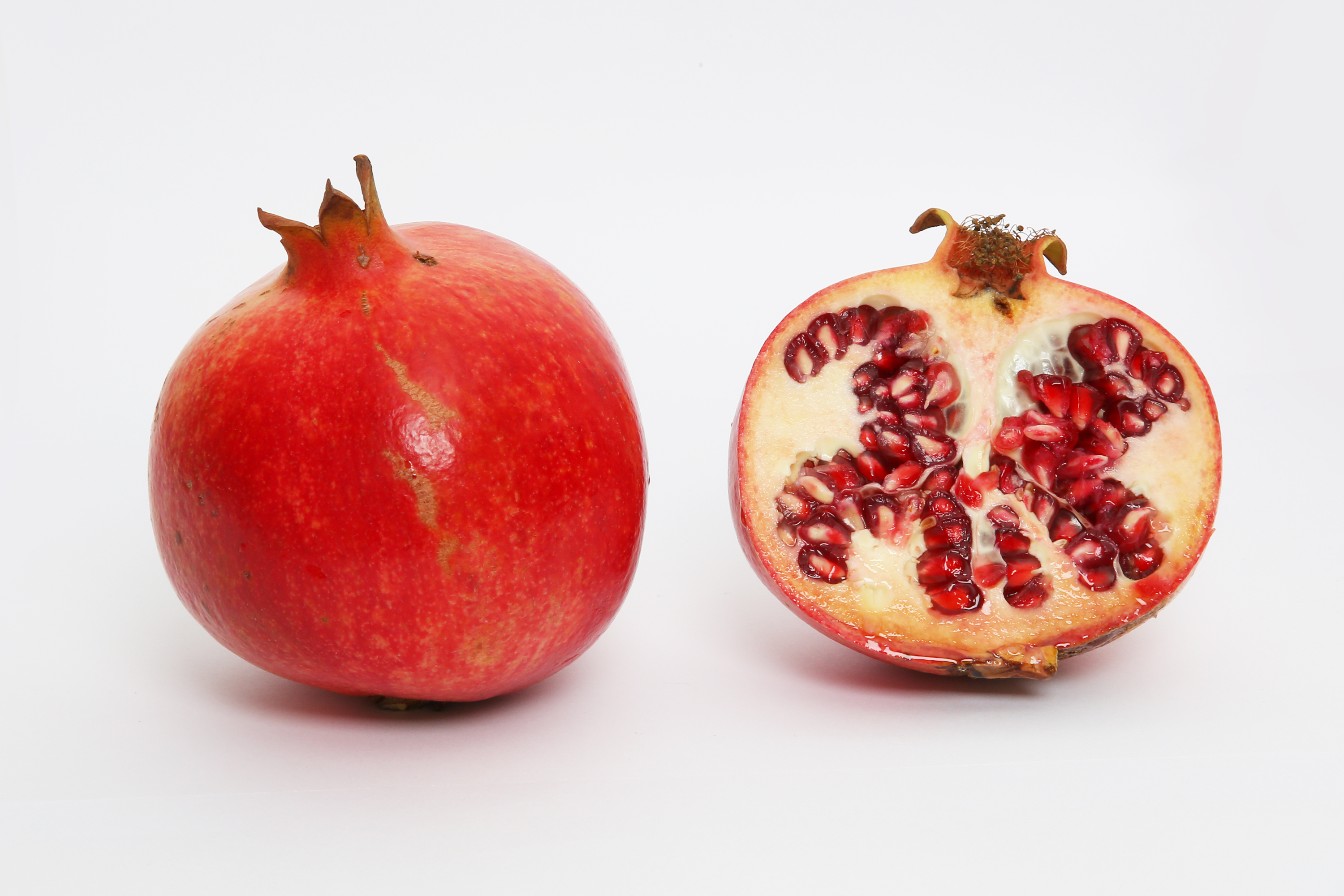 Granatapfel, geschlossen und geöffnet